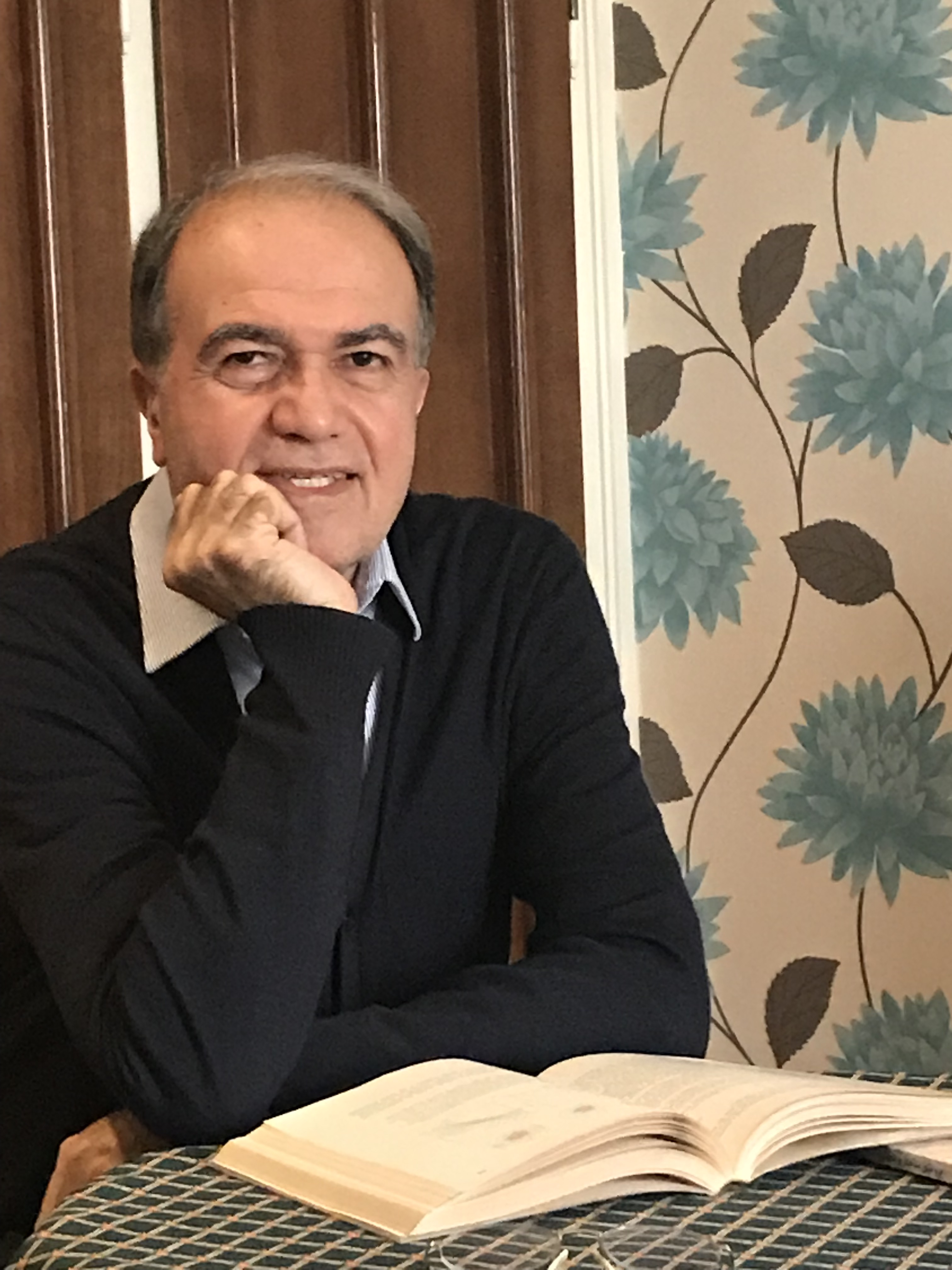 عکس در سال 1397 گرفته شده است